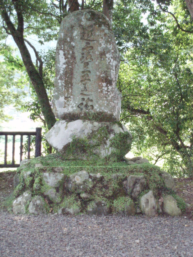 CHIKATSUYU-oji_monument